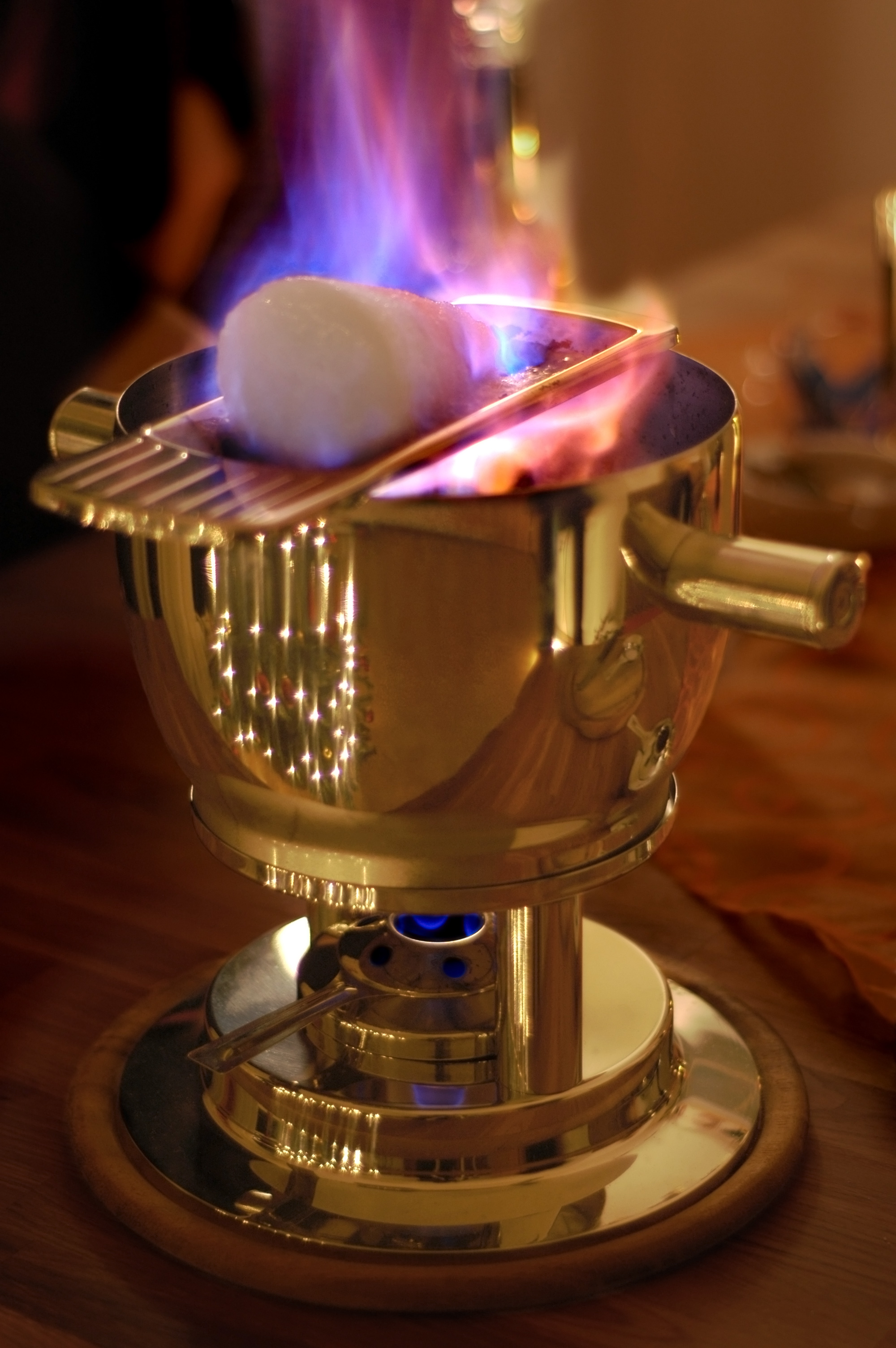 Feuerzangenbowle